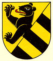 Wappen von Morrens Kanton Waadt Schweiz